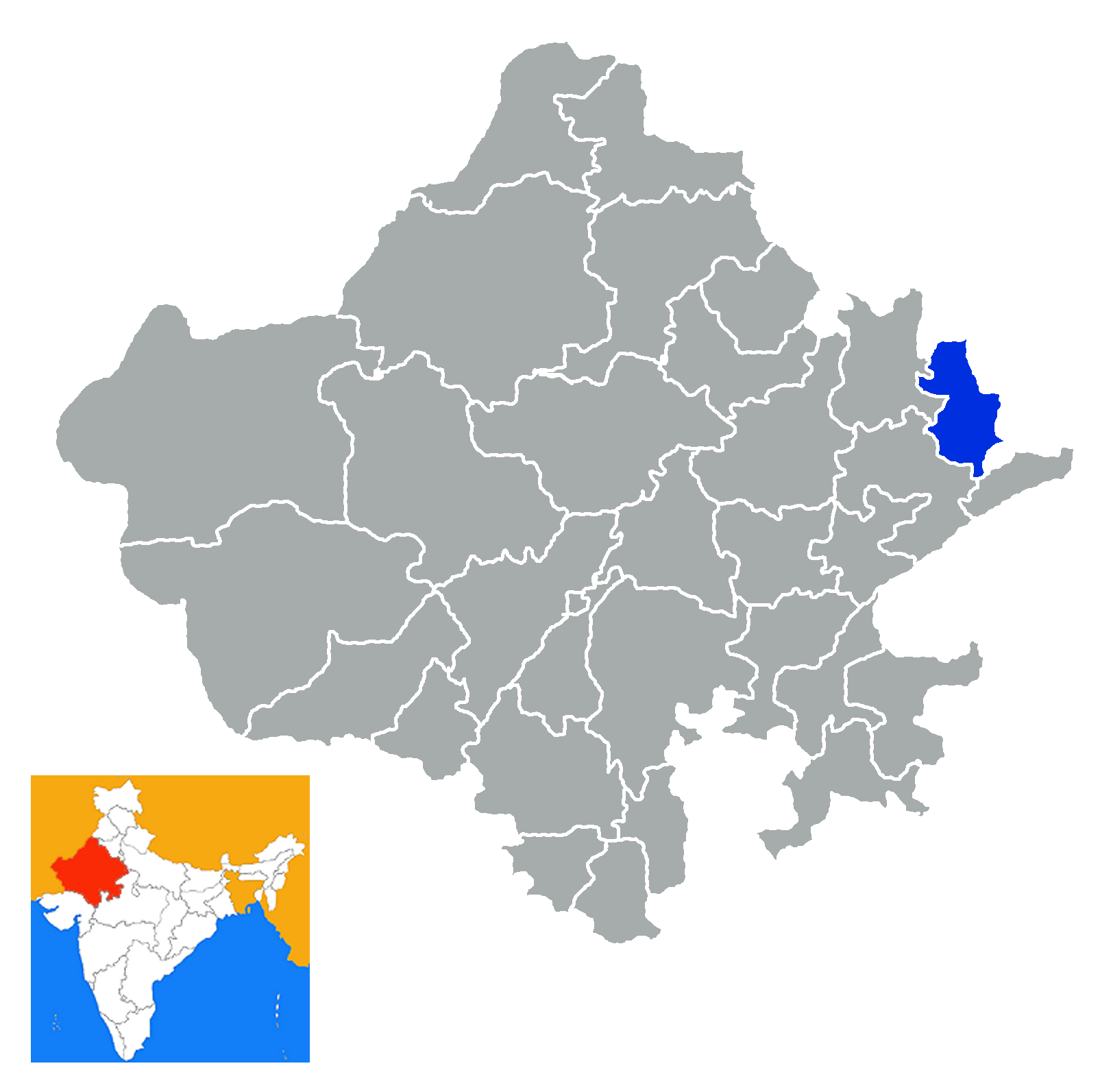 Distrito de Bharatpur Rajastan India